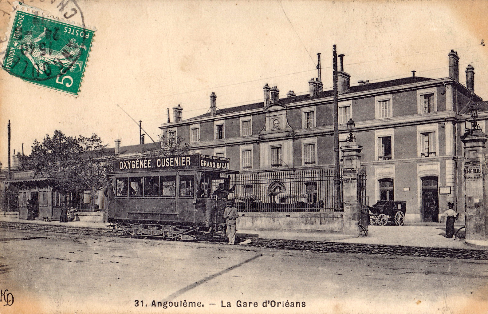 Carte postale ancienne éditée par KD : ANGOULEME - La Gare d'Orléans